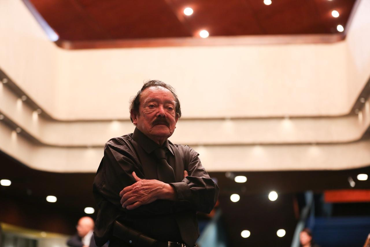 JOAQUÍN ORELLANA. TERCER MUNDO. 102.